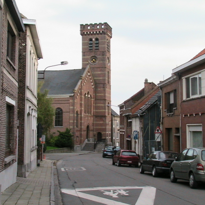 Steendorf: Preĝejo en la dekliva strato "Gelaagstraat".